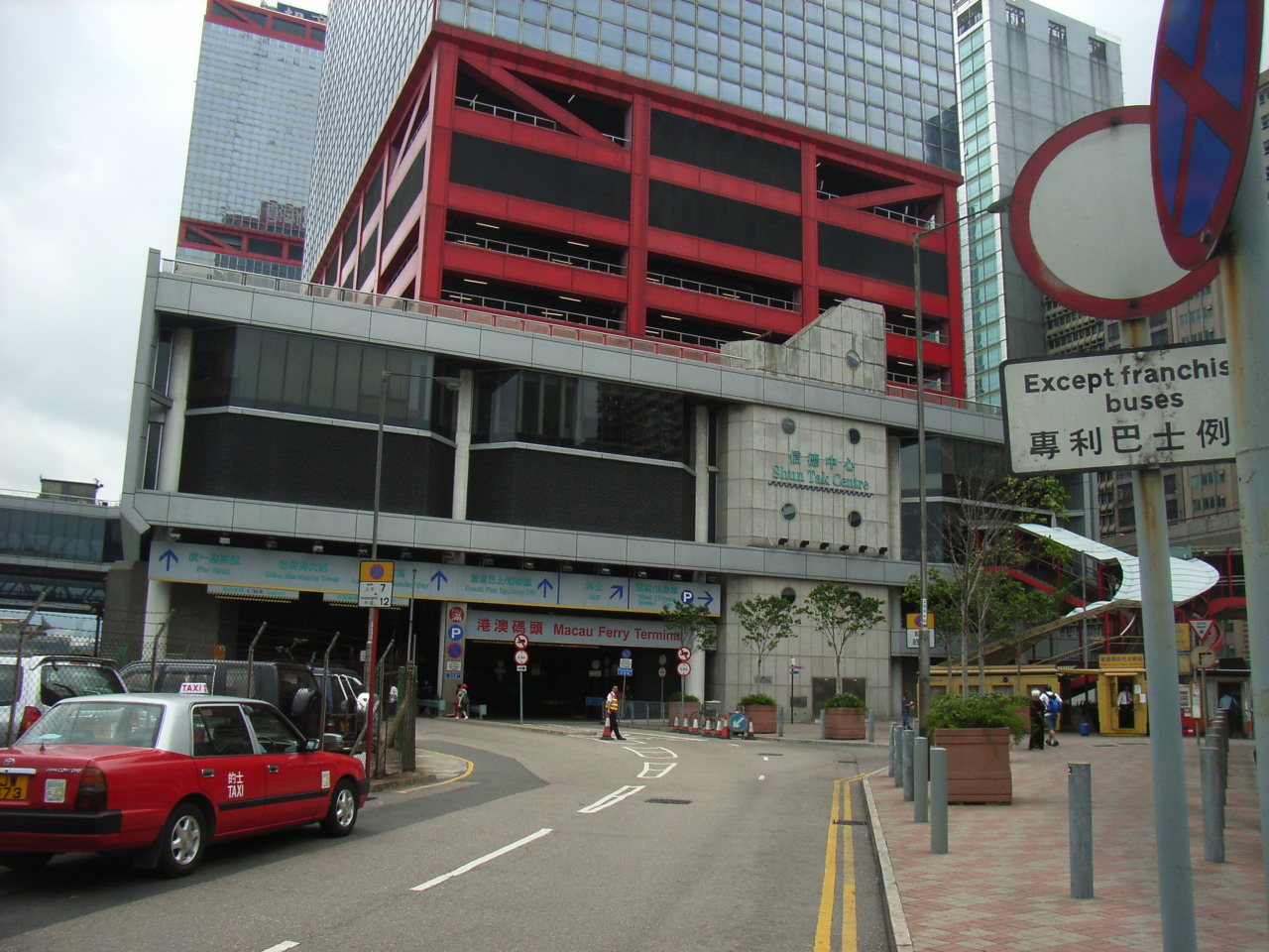 信德中心, Shun Tak Centre, 位於香港上環干諾道中200號。